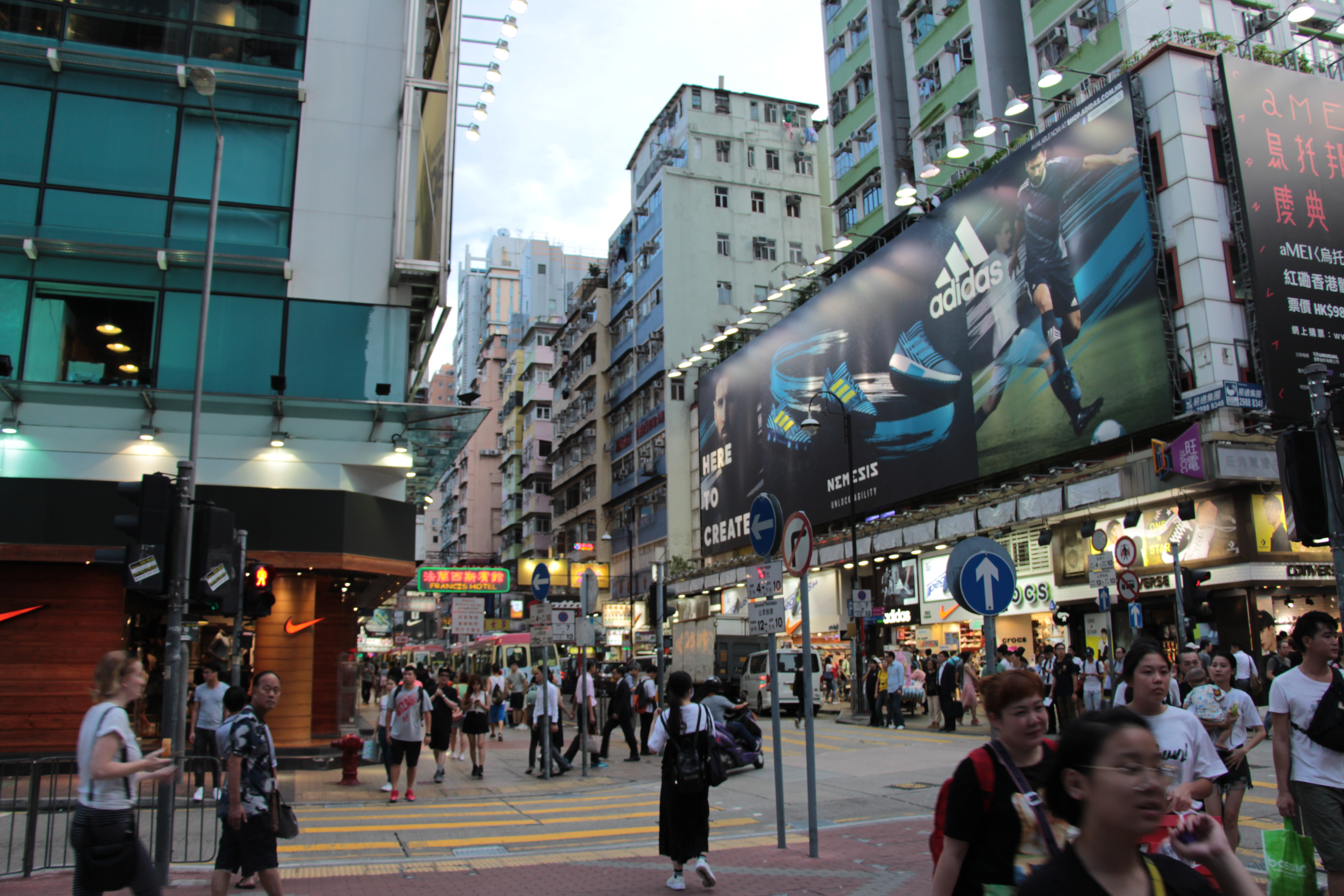 Beliebte Einkaufsstraße in Mong Kok, Hongkong, bestehend vor allem aus Sneaker-Geschäften